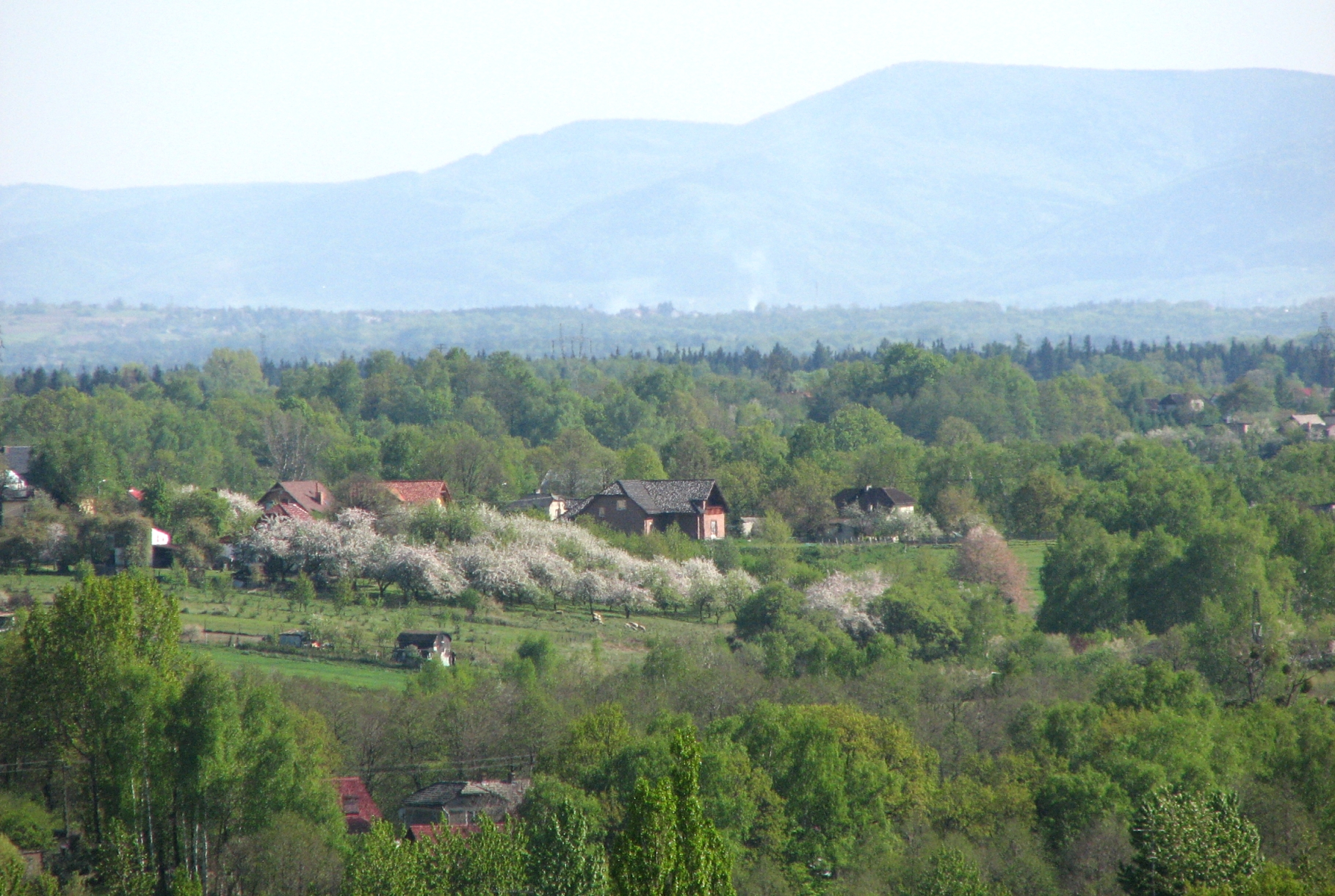 Ruptawa, Jastrzębie Zdrój, Poland, Beskidy, Javorovy, Czech Republic